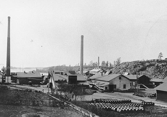 Alfred Nobels verksamhet i Vinterviken, Stockholm